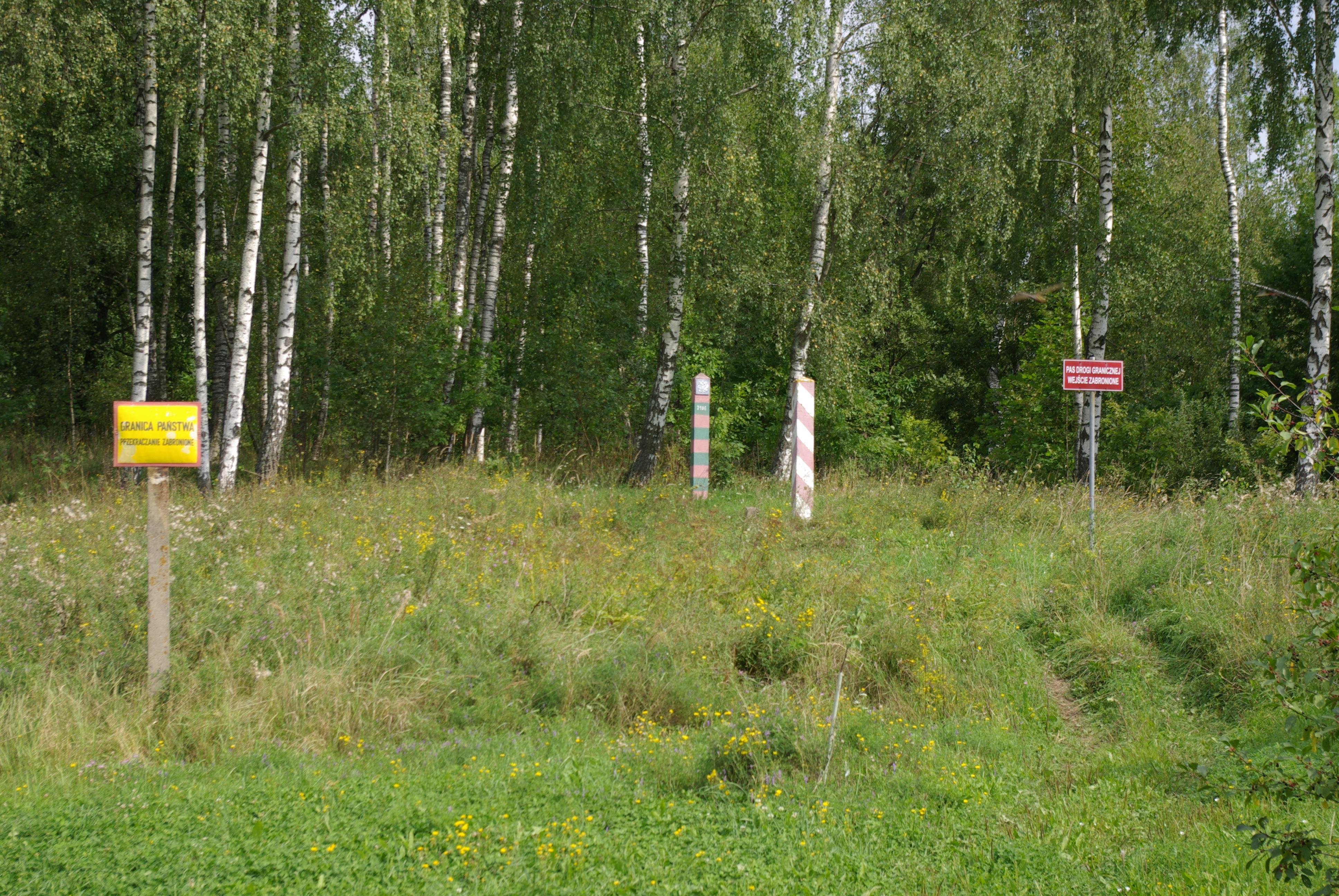 Polnisch-russische Grenze zwischen Rapa (Angerapp, 1938-1945: Kleinangerapp) im polnischen Powiat Gołdapski und Osjorsk (Darkehmen, 1938: Darkheim, 1938-1945: Angerapp) in der russischen Oblast Kaliningrad